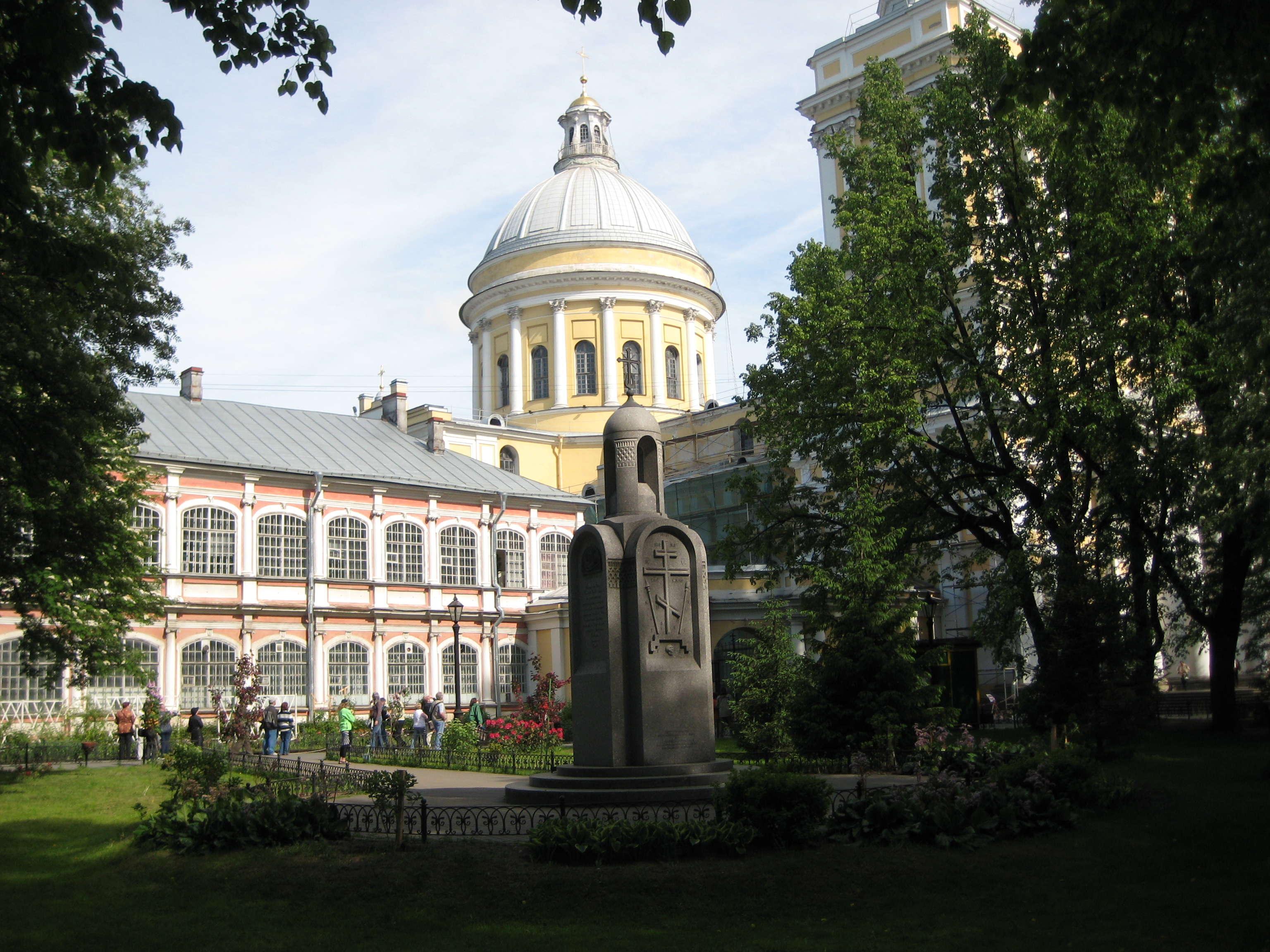 St. Petersburg. Russia. Alexander Nevsky Lavra. Indoor garden. View of Trinity Cathedral and monument 2000 years of Christianity.